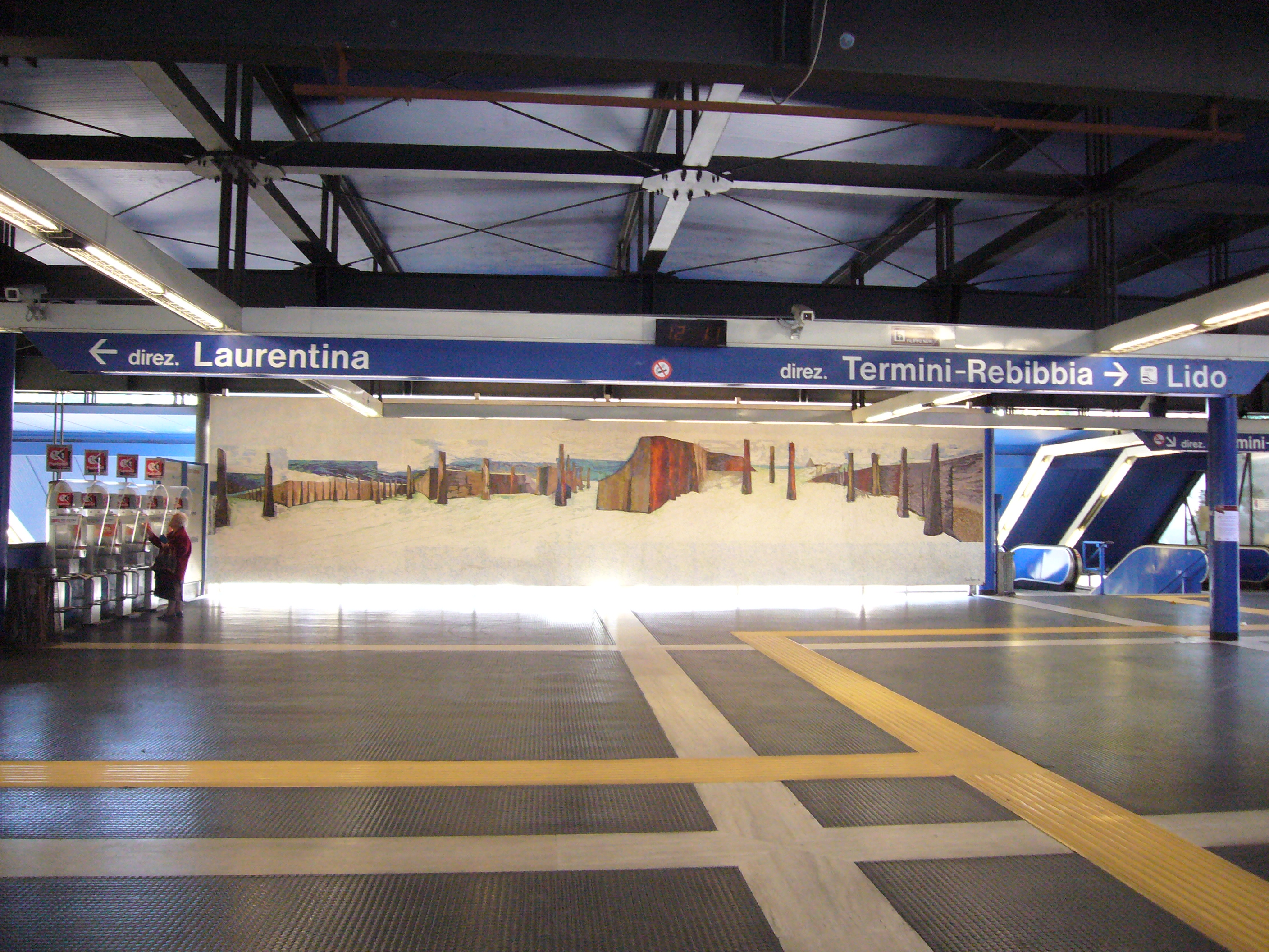 Roma, Metropolitana linea B: stazione Piramide